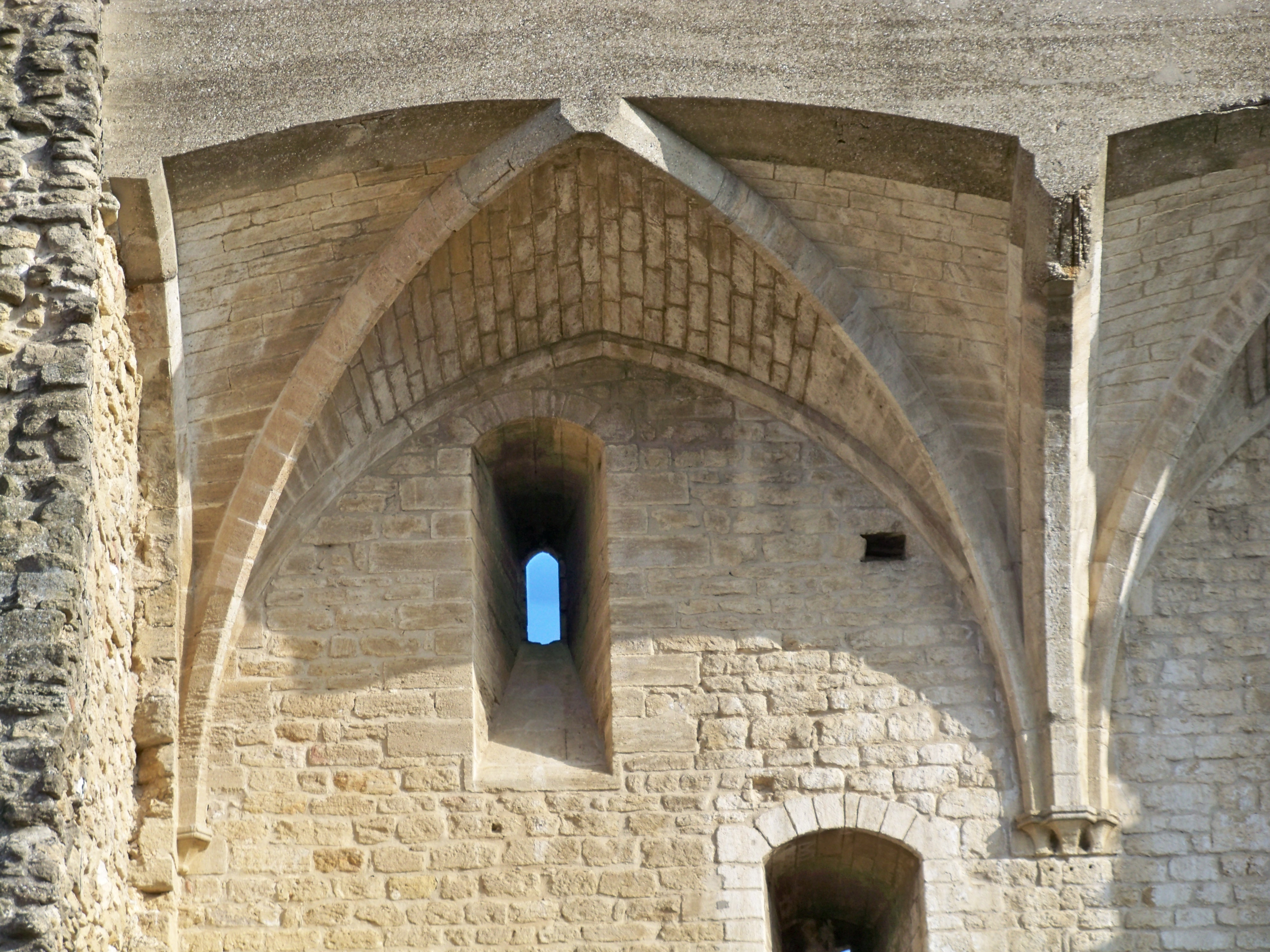 Chateau de Chateauneuf des Papes, Vaucluse, France